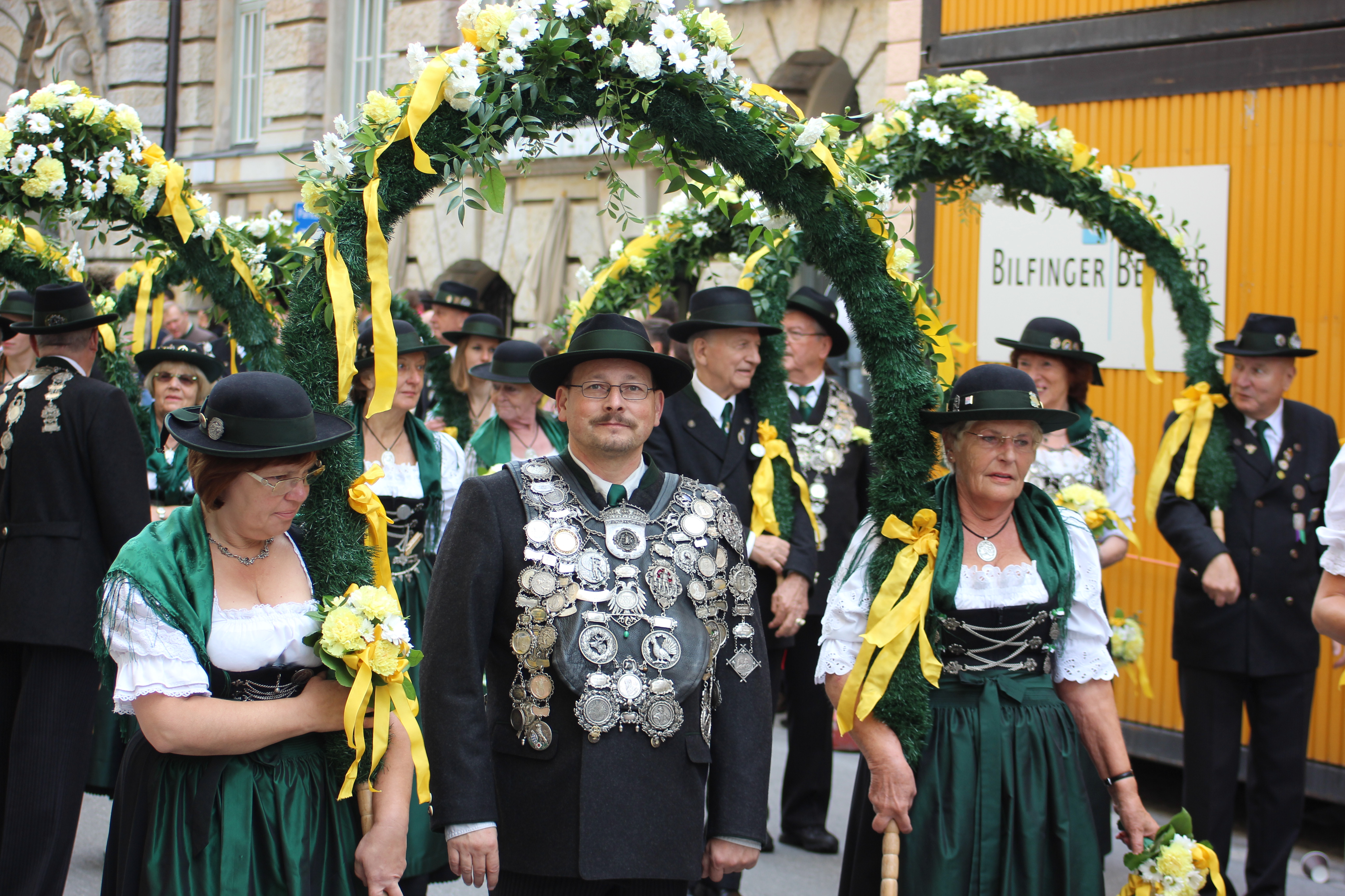 Schützenkönig auf dem Trachten- und Schützenzug in München am ersten Oktoberfestsonntag.